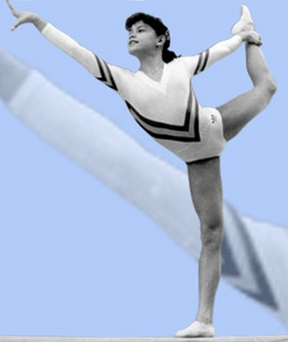 Simona Păucă, 1984 Olympics